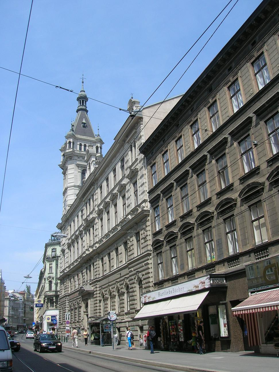 Wahringerstraße mit Bezirksamt, Wien